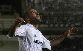 Zinedine Zidane, 2005